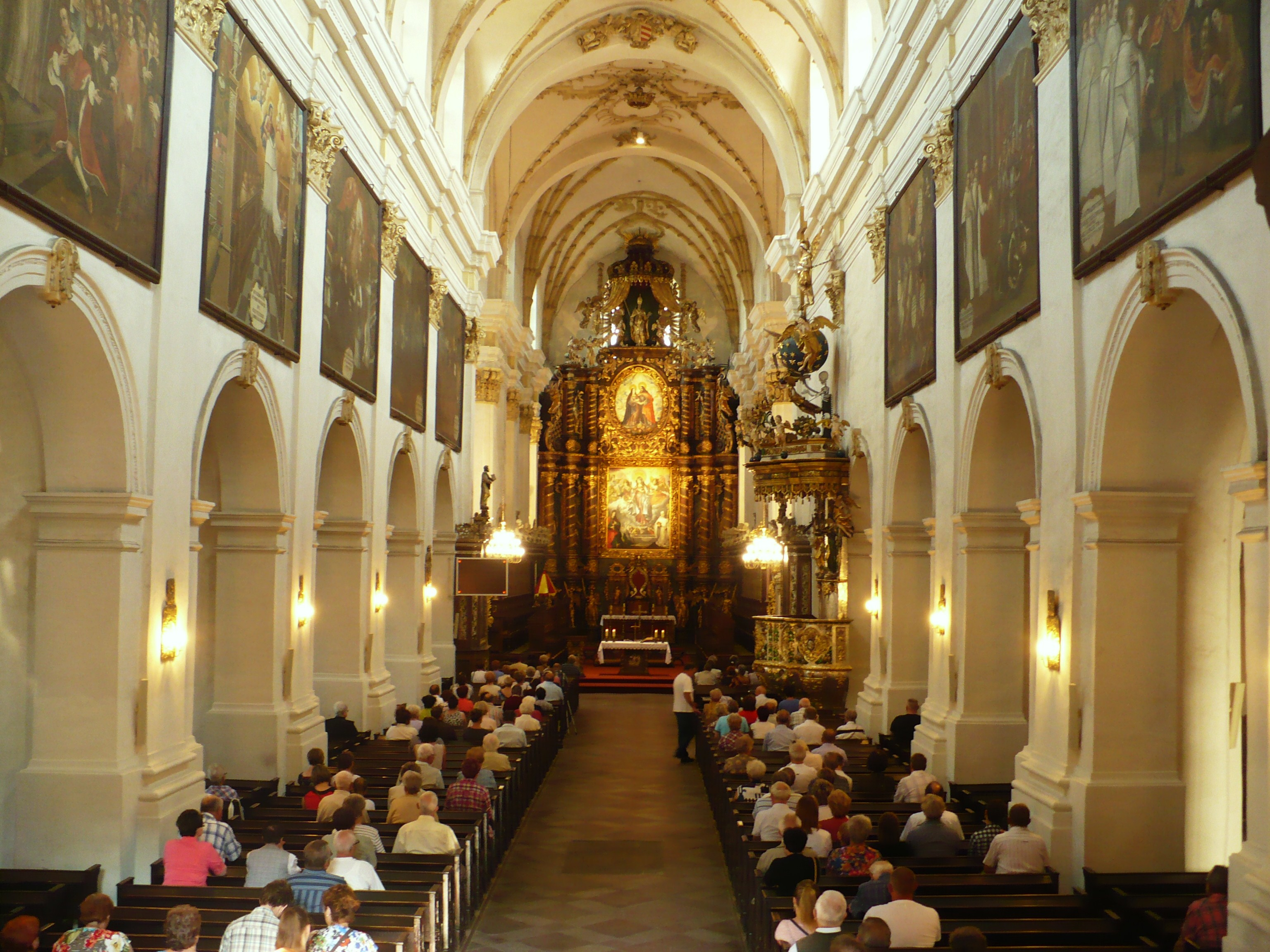 Koronowo, kościół klasztorny cystersów, ob. par. pw. Wniebowzięcia NMP, XIV, 1687